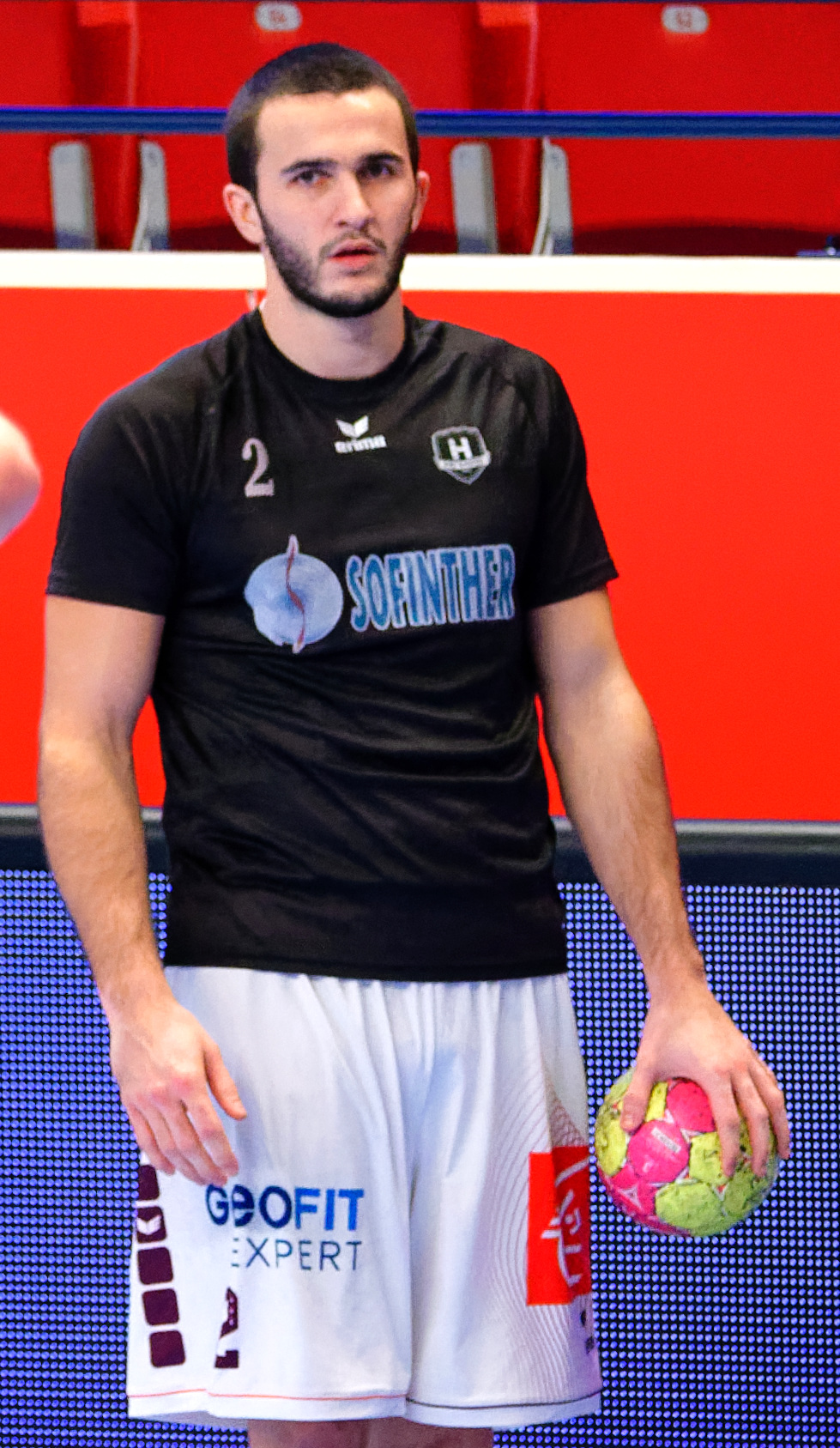 Quart de finale de la Coupe de la Ligue entre le PSG et le HBC Nantes. A Coubertin, le 14 décembre 2017.